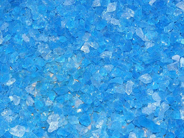 Regeneriertes Silicagel mit Indikatormittel nach ca. 15 Minuten Trocknung im Backofen bei 120 °C